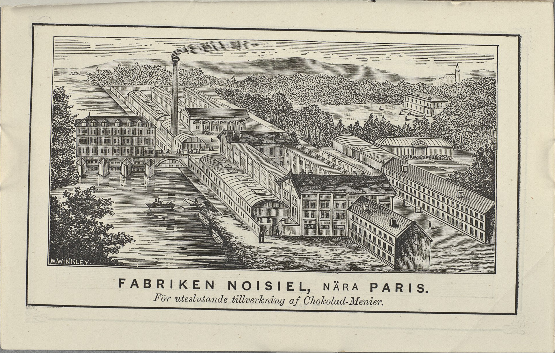 Chokolad-Meniers fabrik i Noisiel.